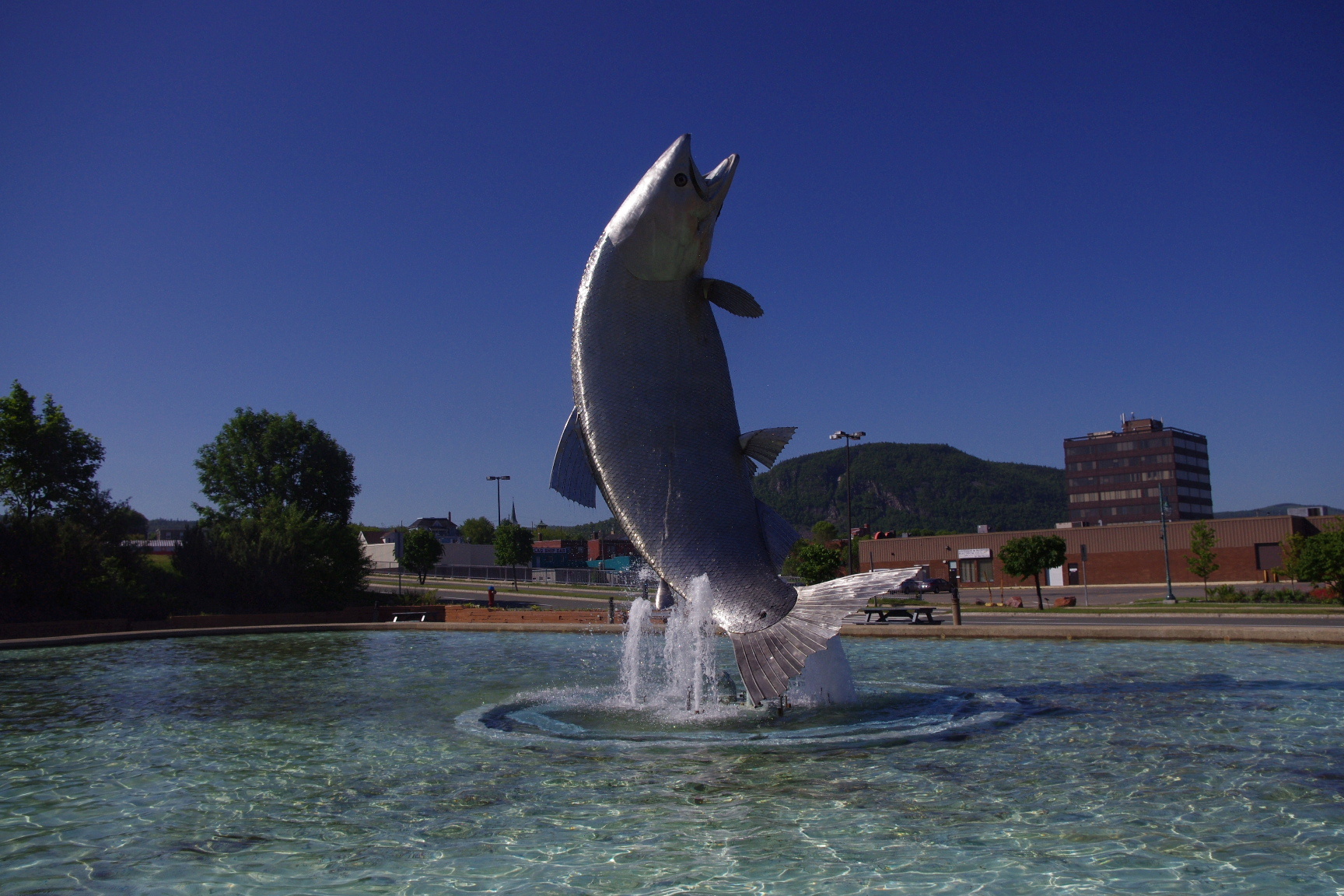 加拿大New Brunswick三文鱼雕像。